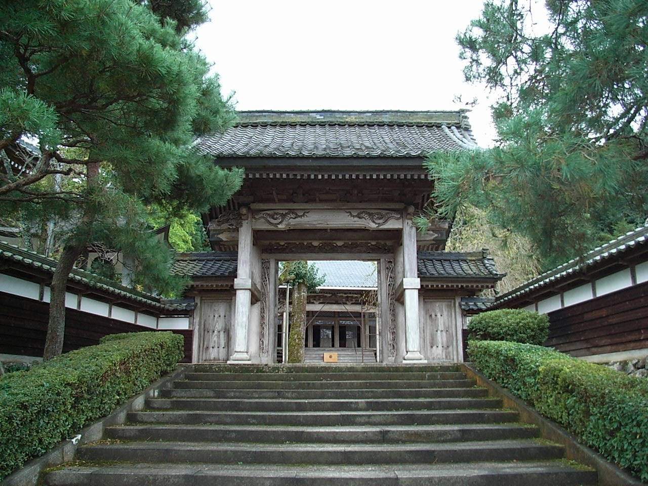 隋應寺の門